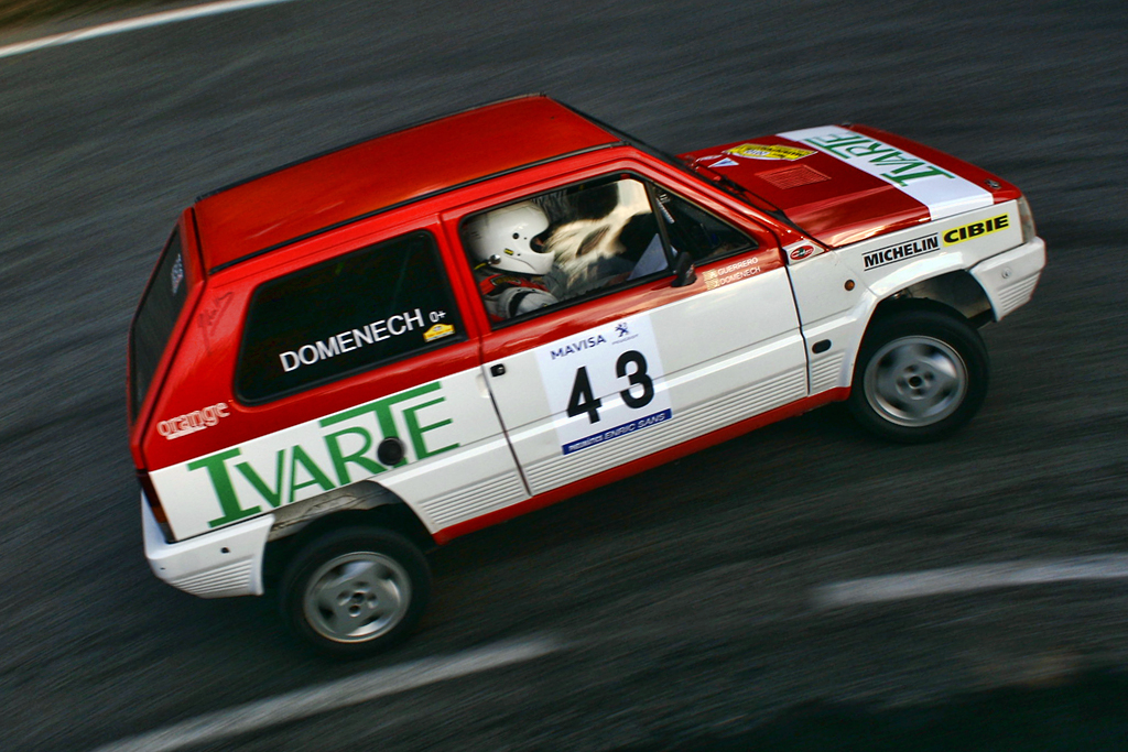 BLACK MOTORSP. JOAQUIM DOMENECH ANTONIO GUERRERO